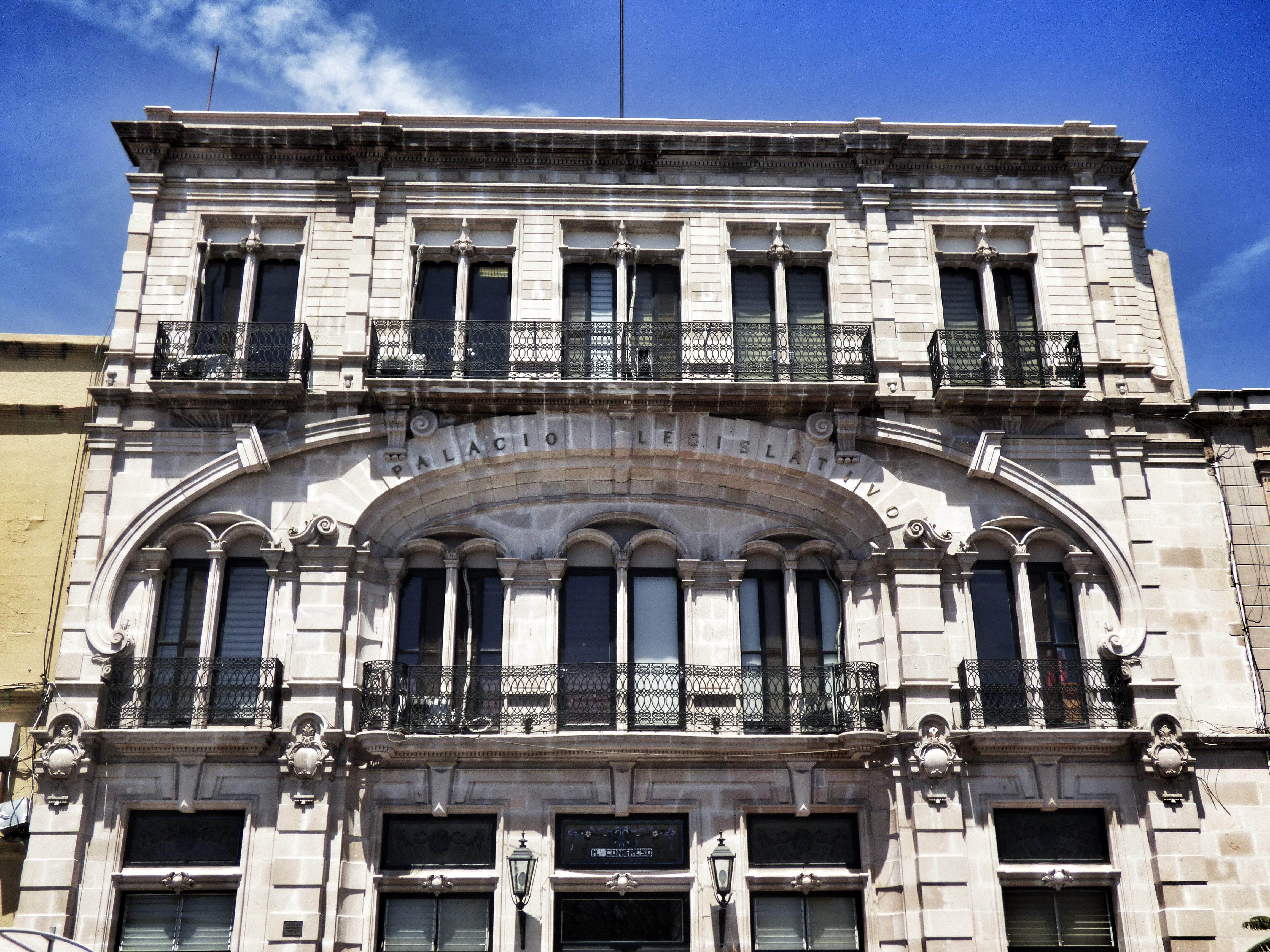 Obra de Refugio Reyes Rivas